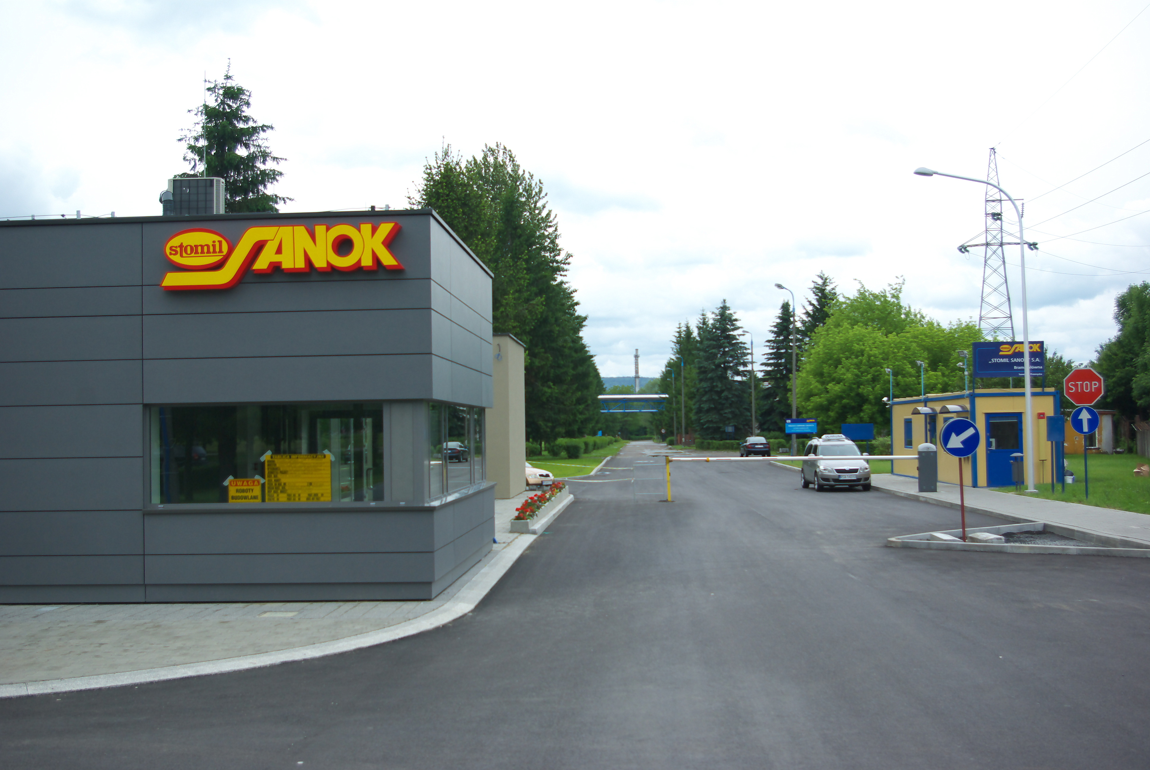 Stomil Sanok, ulica Przemyska